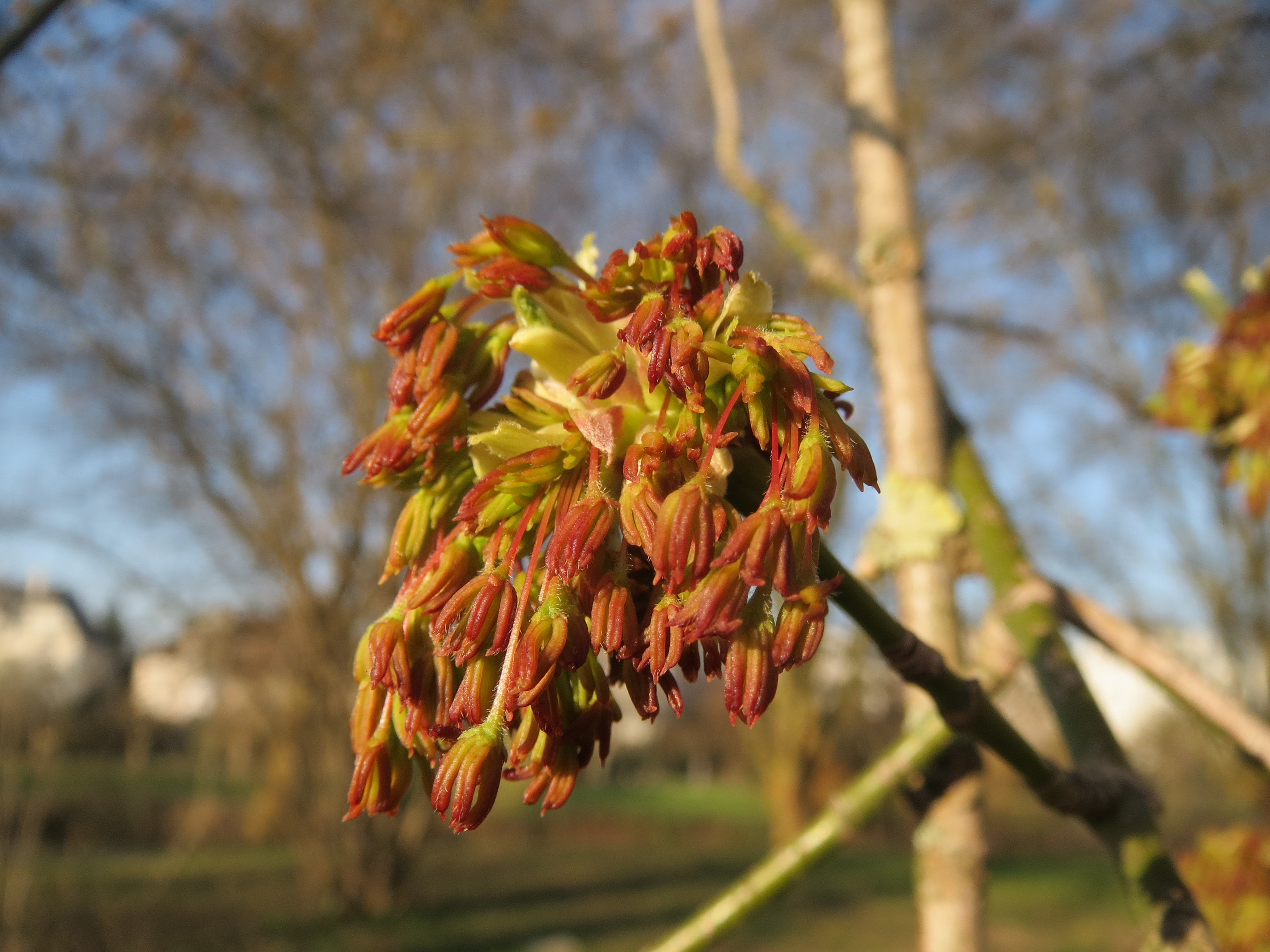 Eschen-Ahorn (Acer negundo) an der Saar in Saarbrücken